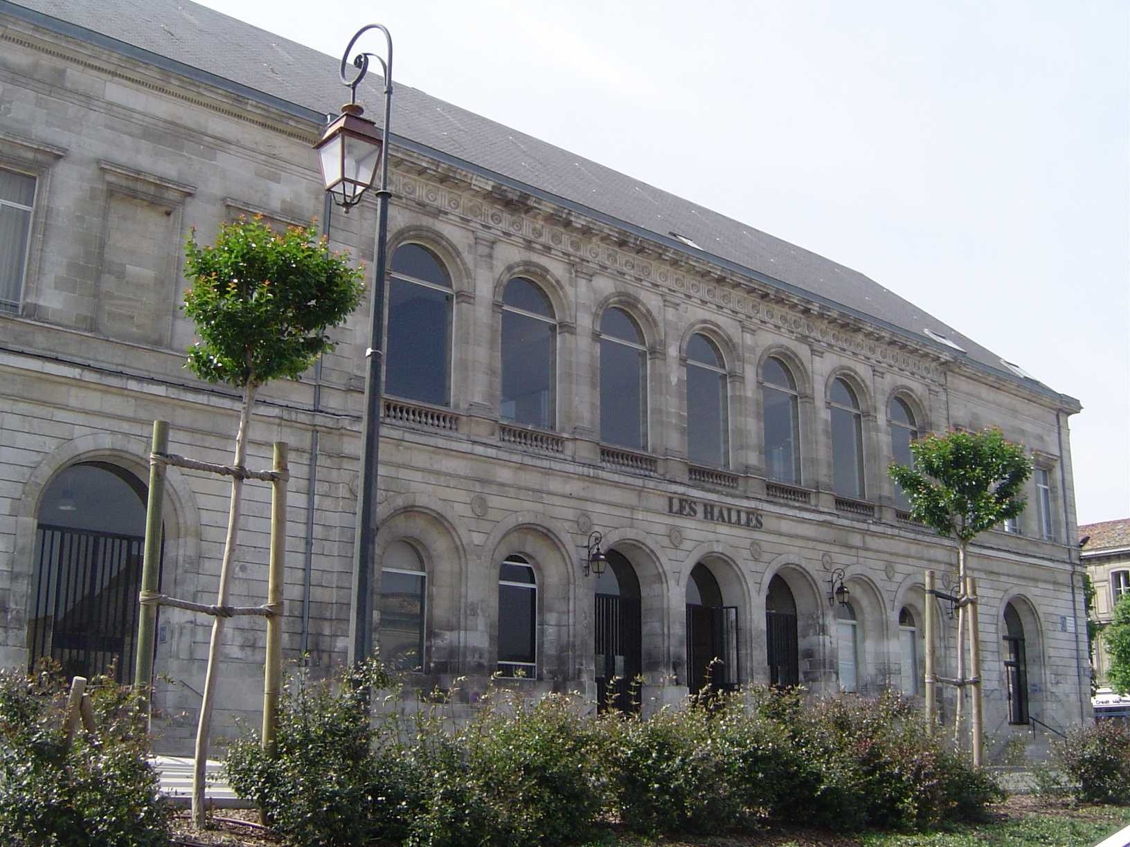 Palais des Congrès et Halles de la Ville de Rochefort (17)